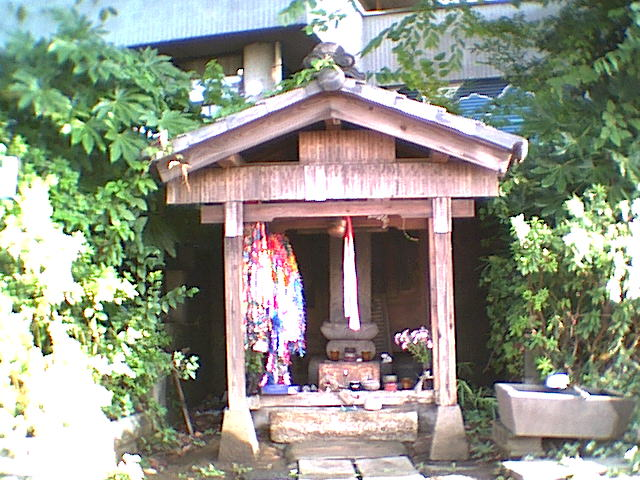 昭和３３年（１９５８年）建立の旧祠です。